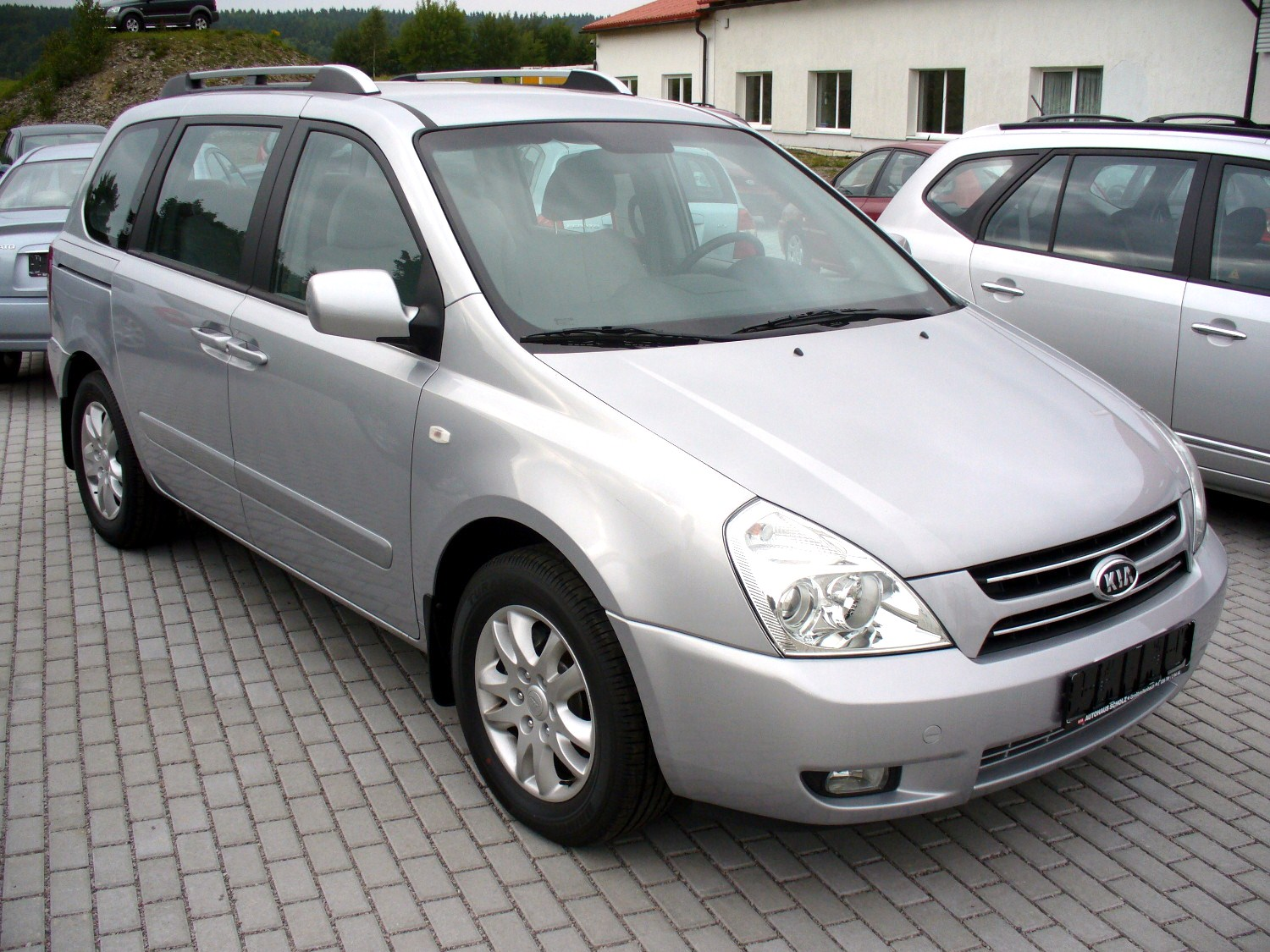 Kia Carnival